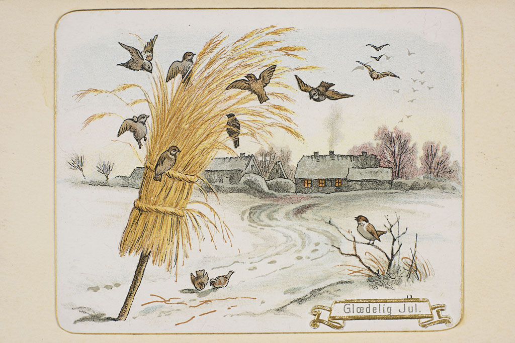 Tittel / Title: Glædelig Jul Motiv / Motif: Postkort / julekort / overrekkelseskort / kartongkort. Dato / Date: ukjent / unknown Kunsnter / Artist: ukjent / unknown Utgiver / Publisher: ukjent / unknown Eier / Owner Institution: Nasjonalbiblioteket / National Library of Norway Lenke / Link: Bildesignatur / Image Number: blds_01767